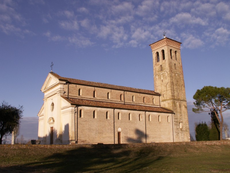 Antica abbazia Summaga (VE)